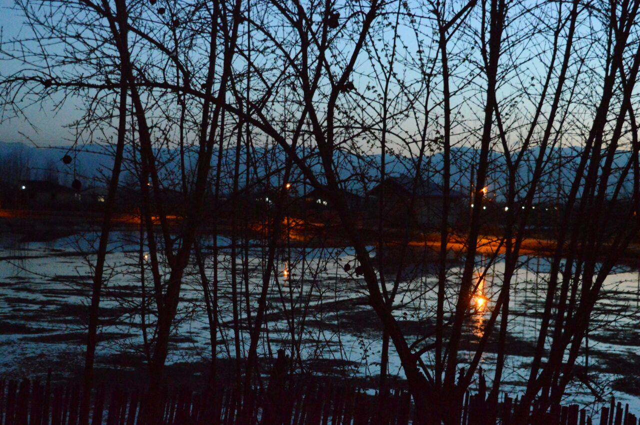 نمایی از یک زمین کشاورزی در منطقه سیاه درویشان بعد از غروب آفتاب